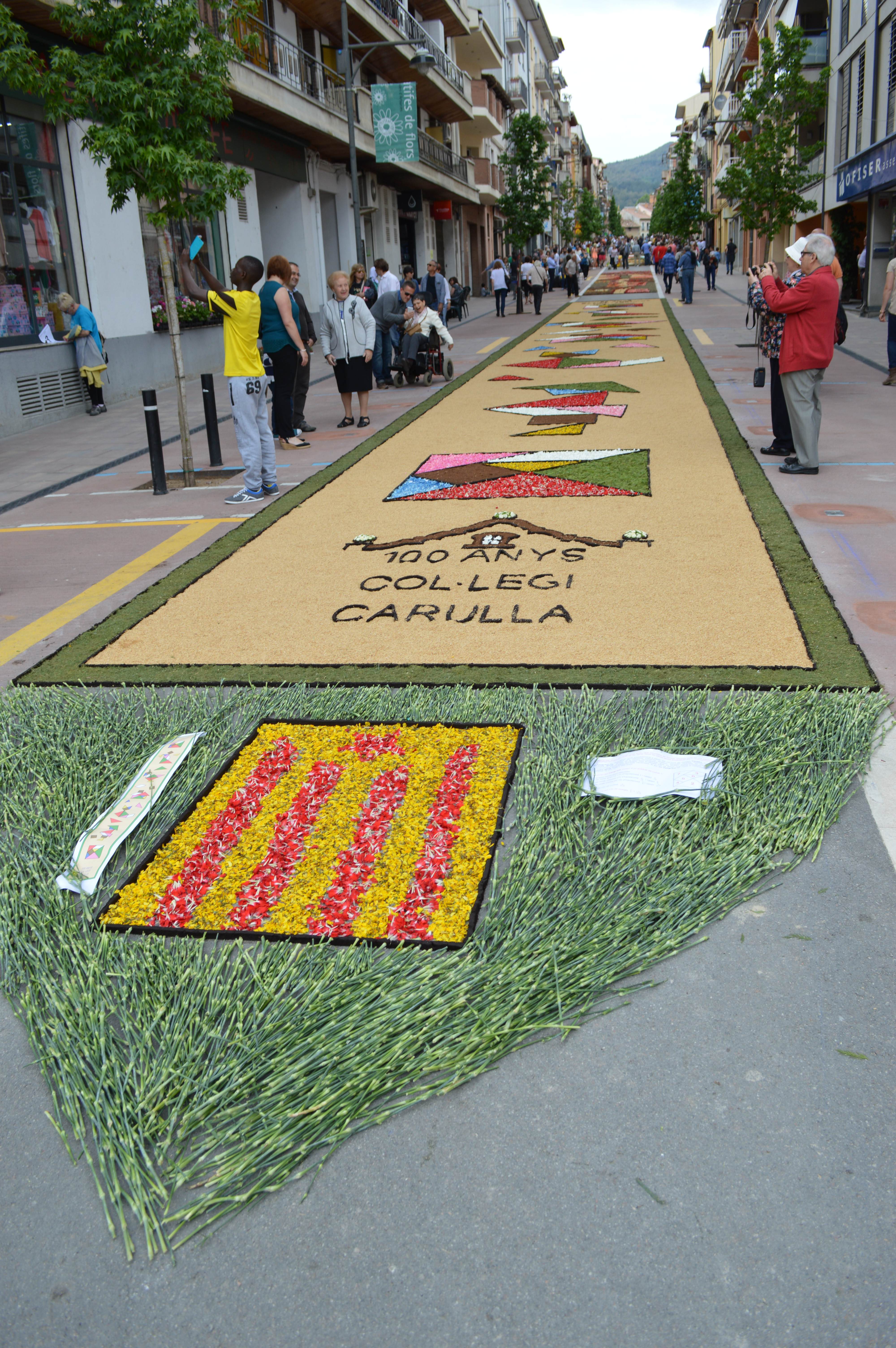 Catifa de flors de la carretera feta per estudiants i professorat de l'IES Montsoriu.